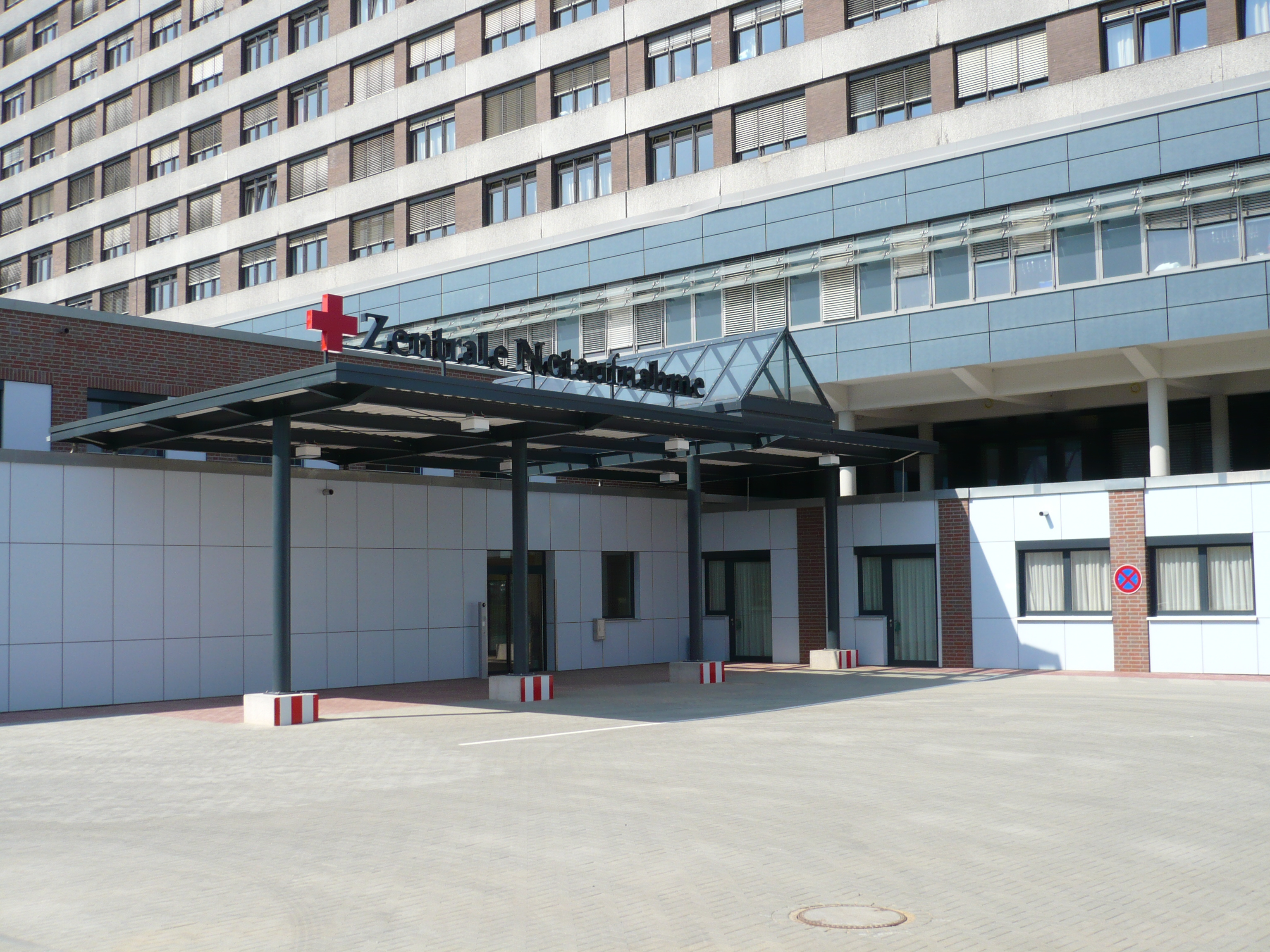 Asklepios Klinik Wandsbek, Hamburg Eingang der neuen Zentralen Notaufnahme